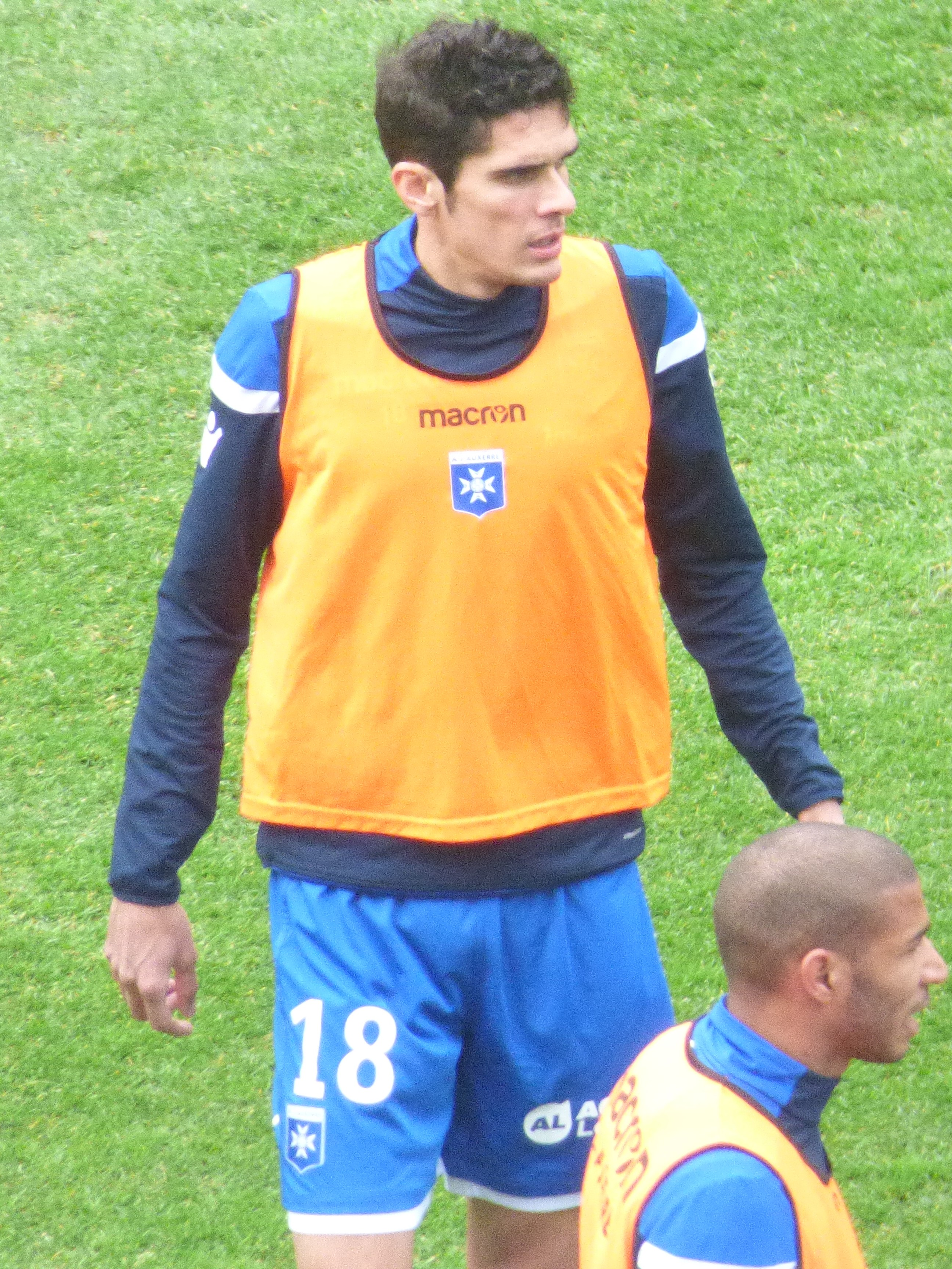 François Bellugou avant le match RC Lens - AJ Auxerre, comptant pour la 28ème journée du championnat de France de football de Ligue 2 2018-2019, le 9 mars 2019 au Stade Bollaert-Delelis.